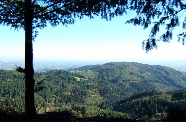 Vue du côté Nord du Mont Chatard, dans le Beaujolais (France)